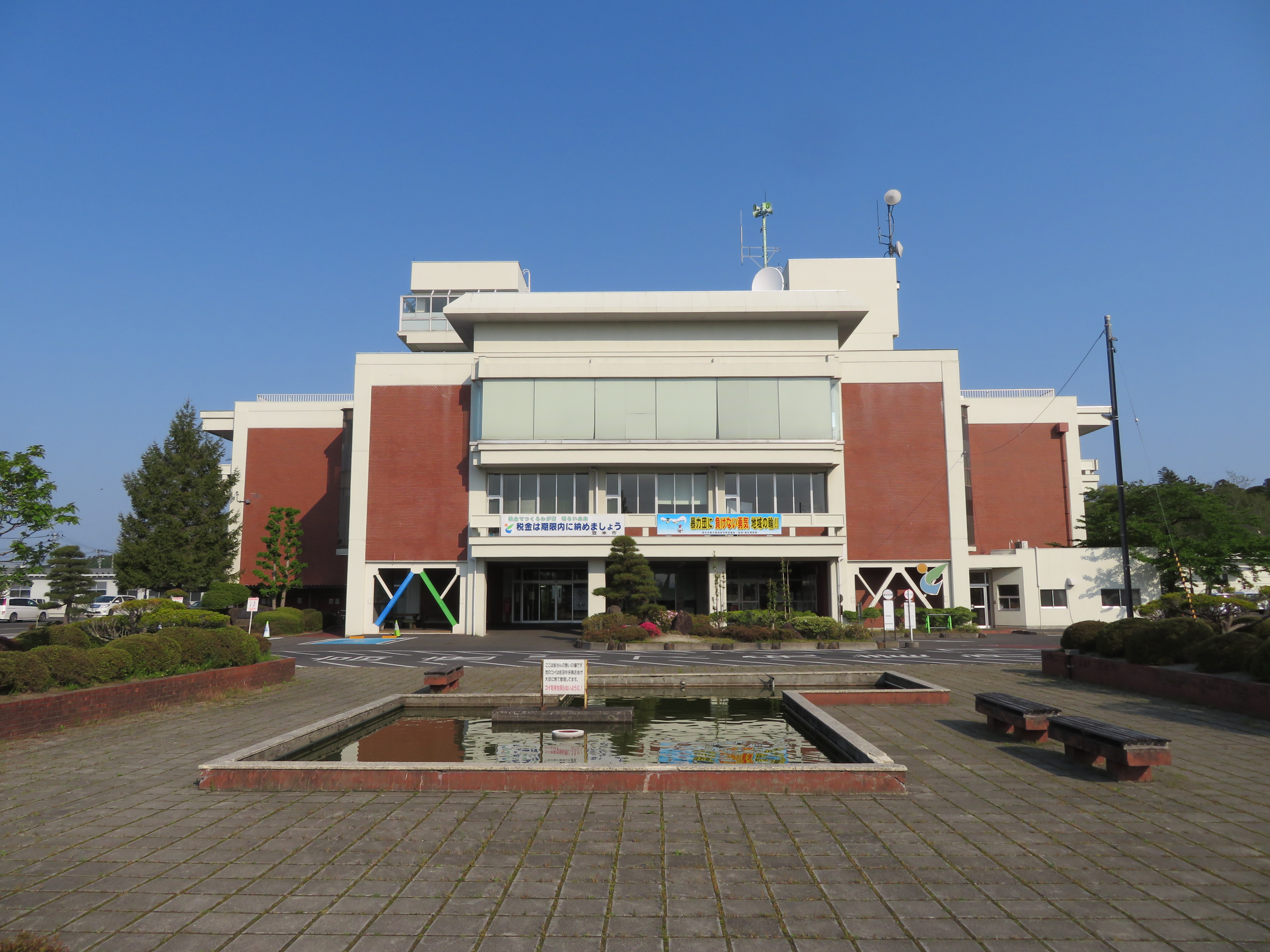 登米市役所本庁舎（旧迫町役場庁舎） Canon PowerShot SX720 HS